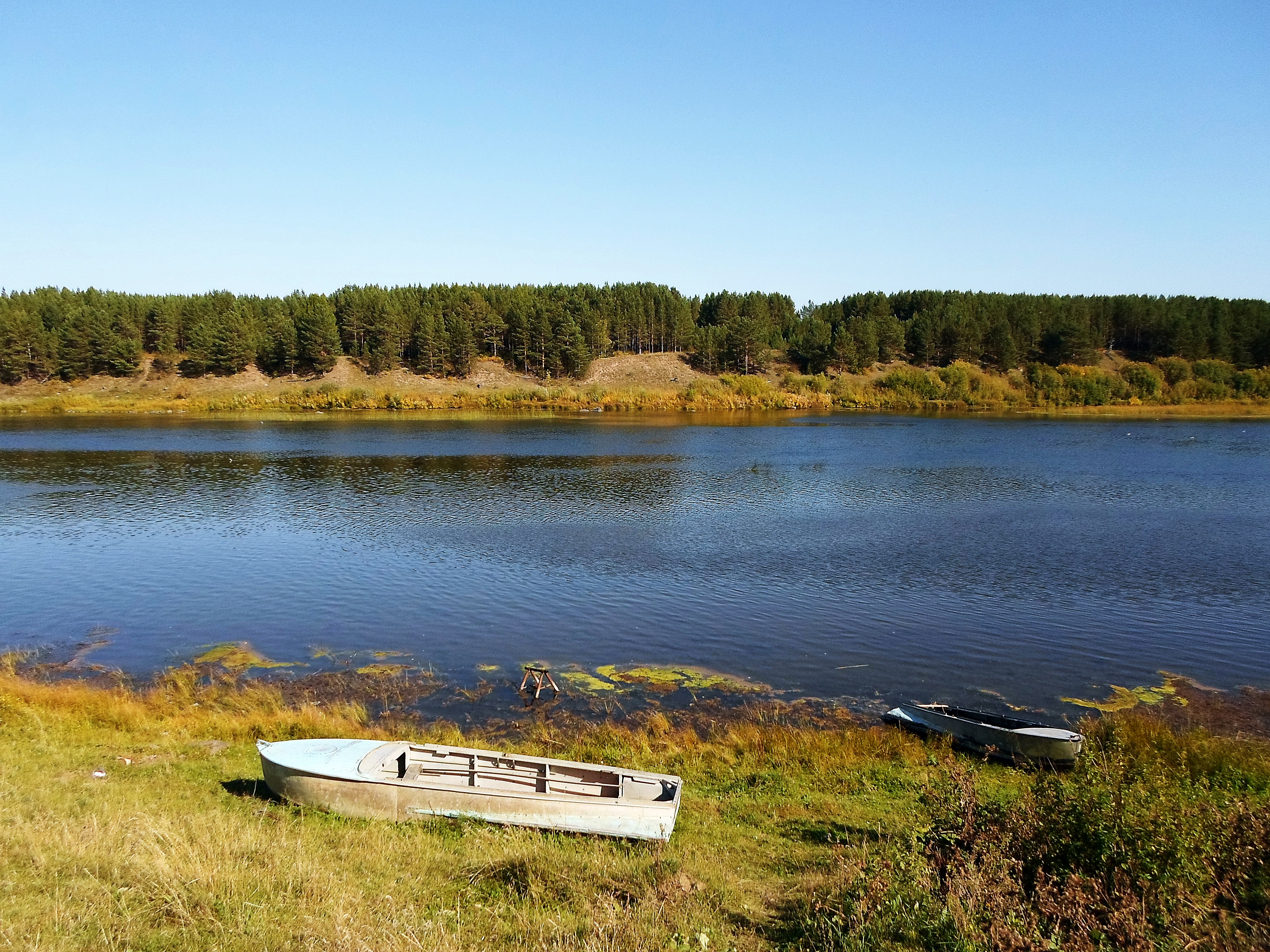 Река Чадобец у села Заледеево. Кежемский район Красноярского края.